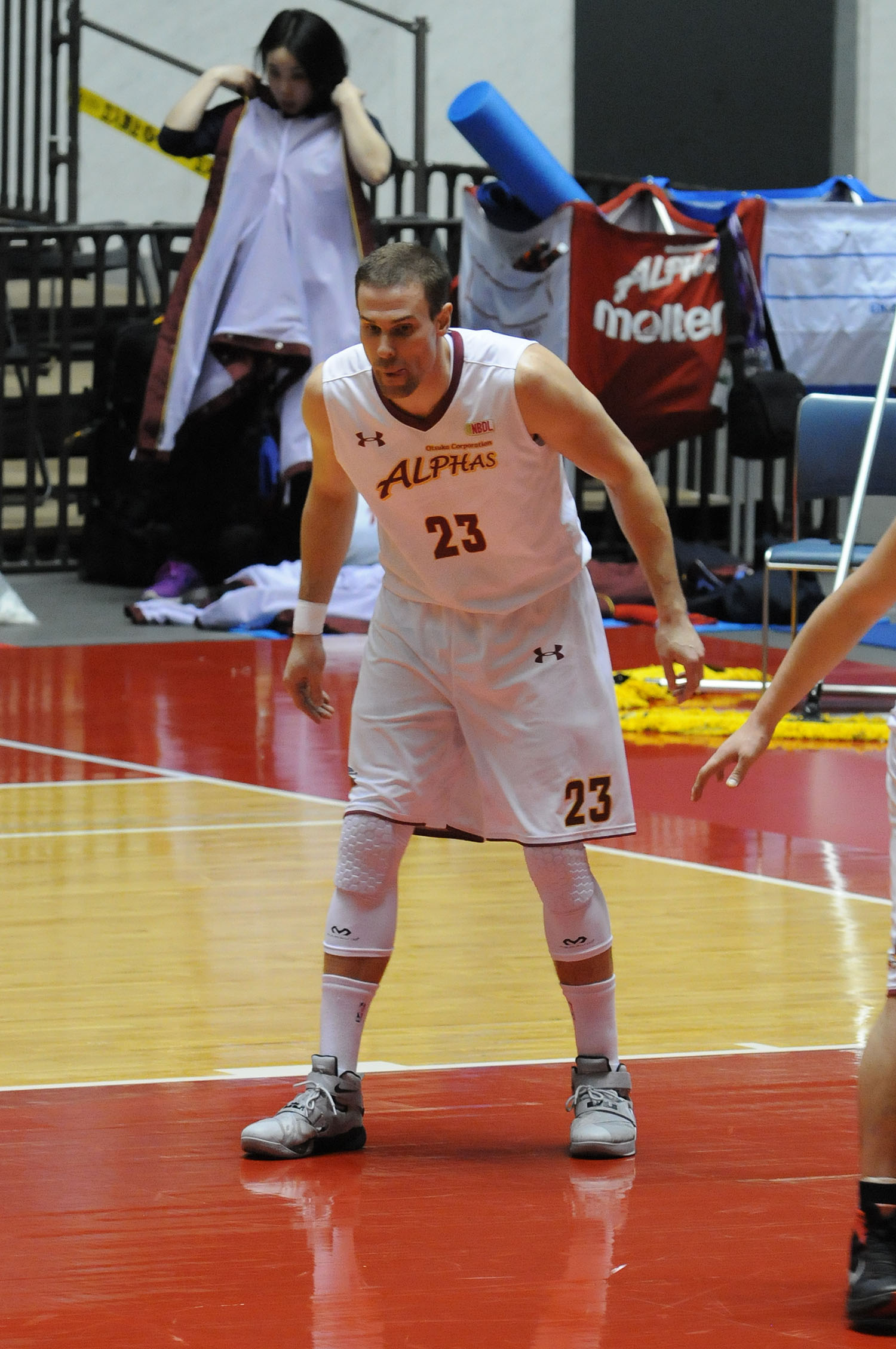 大塚商会アルファーズ、ジャスティン・ヘラルド選手。代々木第一体育館で。